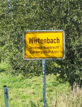 Ortsschild von Wirtenbach (Gemeinde Nümbrecht)